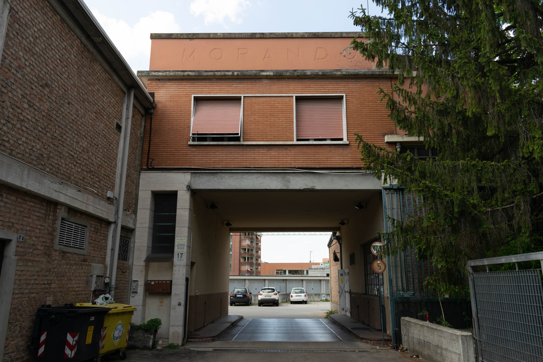 Attraverso un portale, sovrastato dalla scritta MORANDO, si accedeva al cortile interno su cui si affacciavano gli edifici destinati alla produzione.